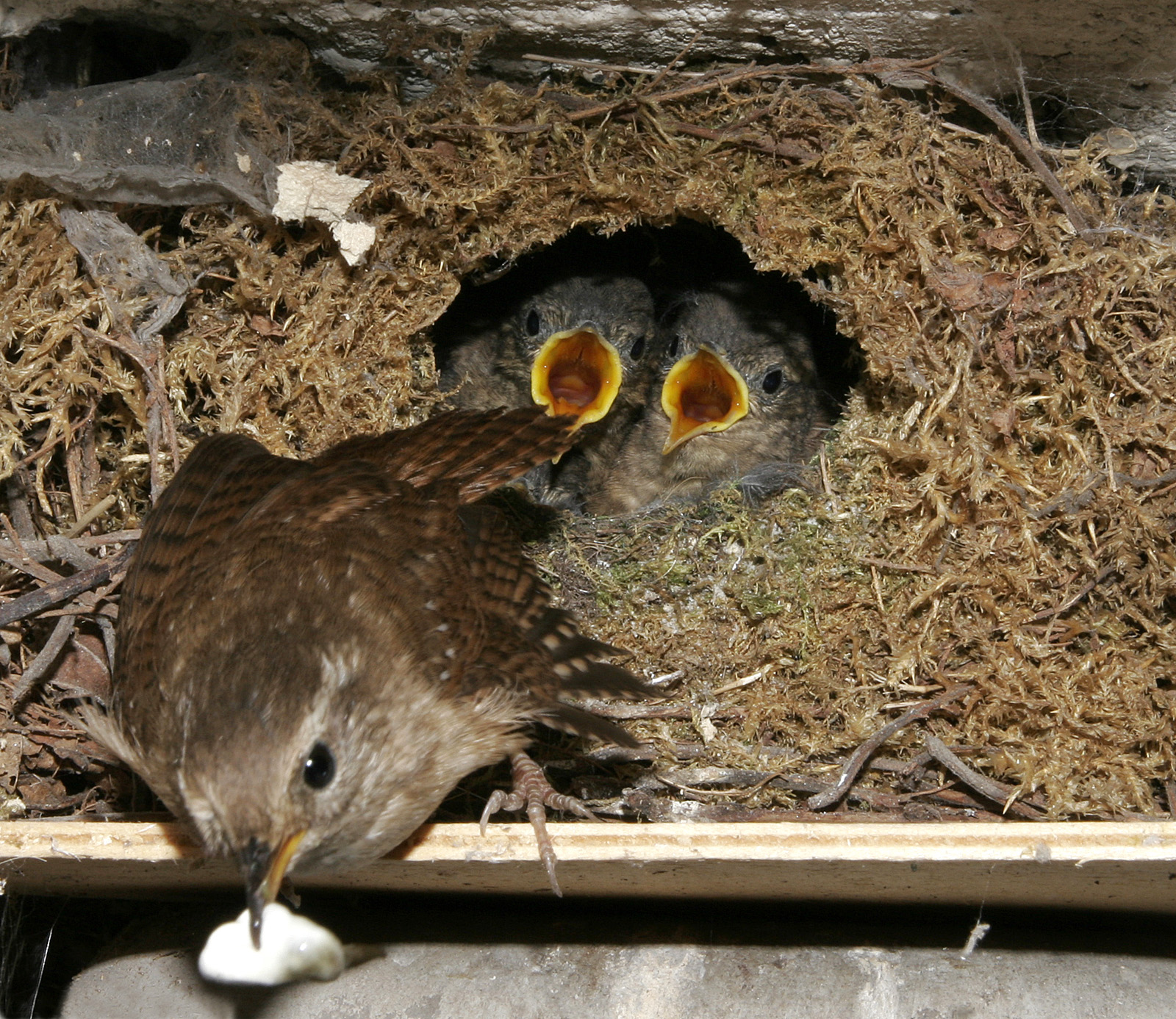 Winter Wren (Troglodytes troglodytes), adult with hatchlings, picture taken on May 5th, 2007 in Bensheim (Germany). The adult removes the feces of one hatchling. Sequence of 6 pictures.